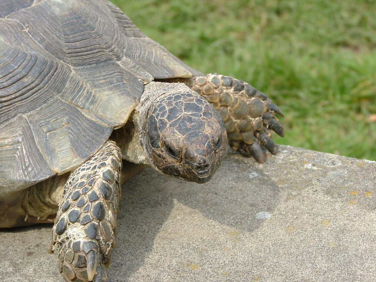 Testudo marginata mit großem Armschuppen und Kopfschildern